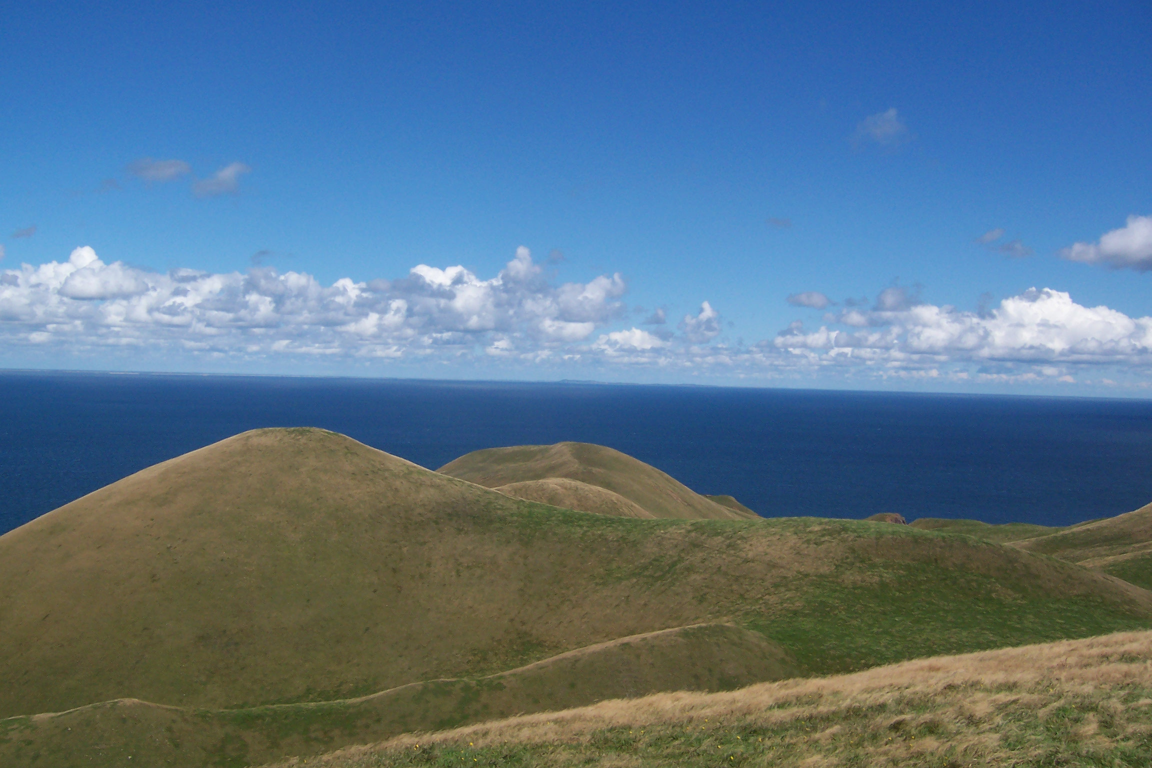 Collines herbeuses sur la partie est de l'île d'Entrée, Îles de la Madeleine